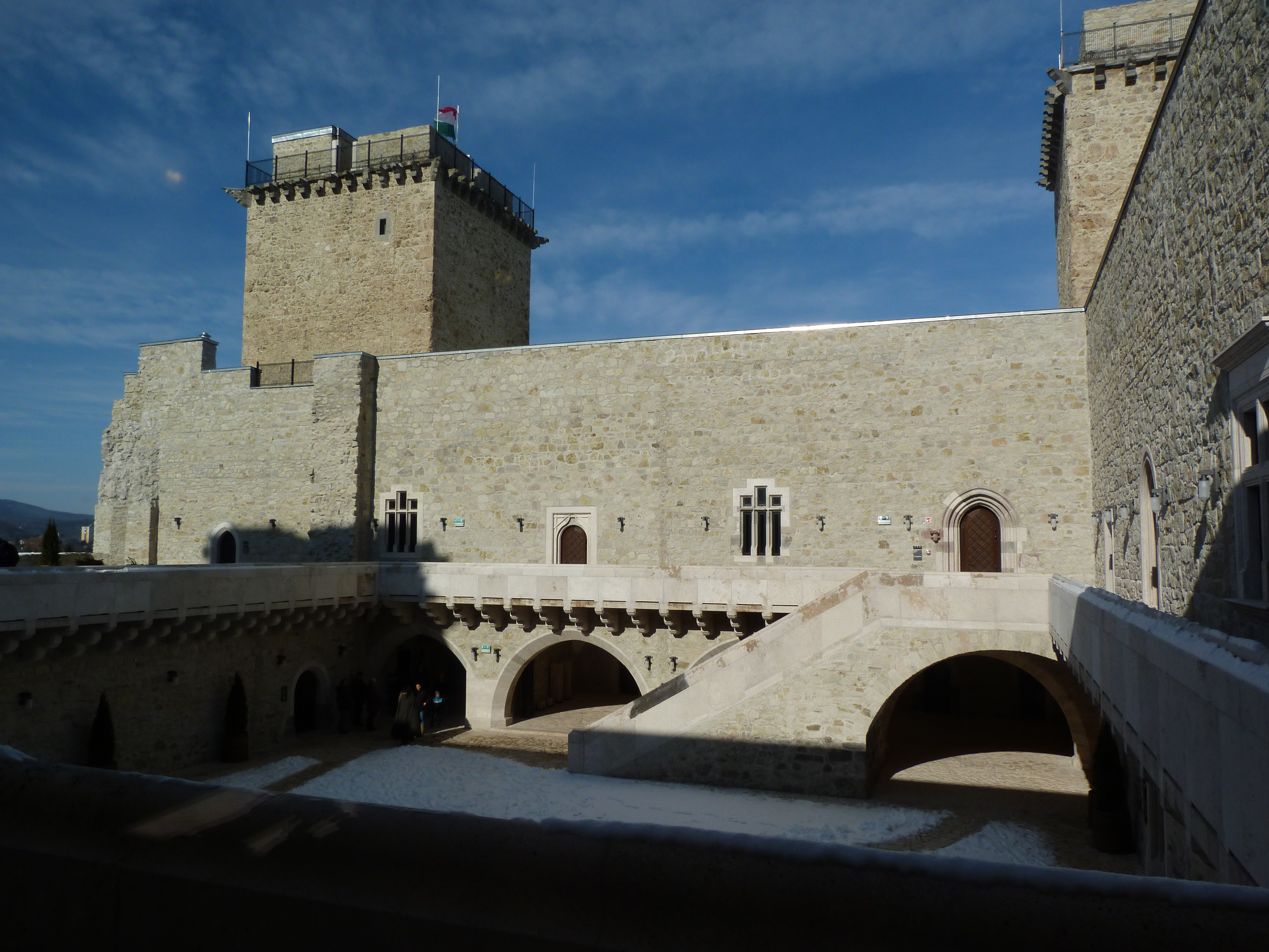 A felvétel 2015. február 7-én szombaton készült Diósgyőr Várában. ©© Derzsi Elekes Andor, Budapest, 2015, A fénykép másolását és felhasználását a szerző ellenérték nélkül, jogutódjaira is kihatóan megengedi. Az engedély kiterjed a kereskedelmi célú hasznosításra is. Kéri azonban nevének feltüntetését a felhasználás során. A Metapolisz sorozat valamennyi képe és filmje Creative Commons alatti valamint kereskedelmi - for profit - célra is felhasználható. Ajánlott hivatkozás: Derzsi Elekes Andor: Metapolisz DVD line